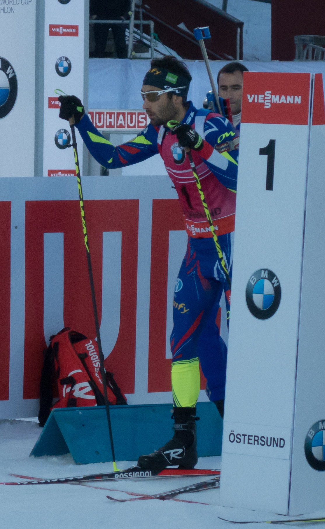 Martin Fourcad strax innan start i Jaktstarten vid Världscupen i Östersund